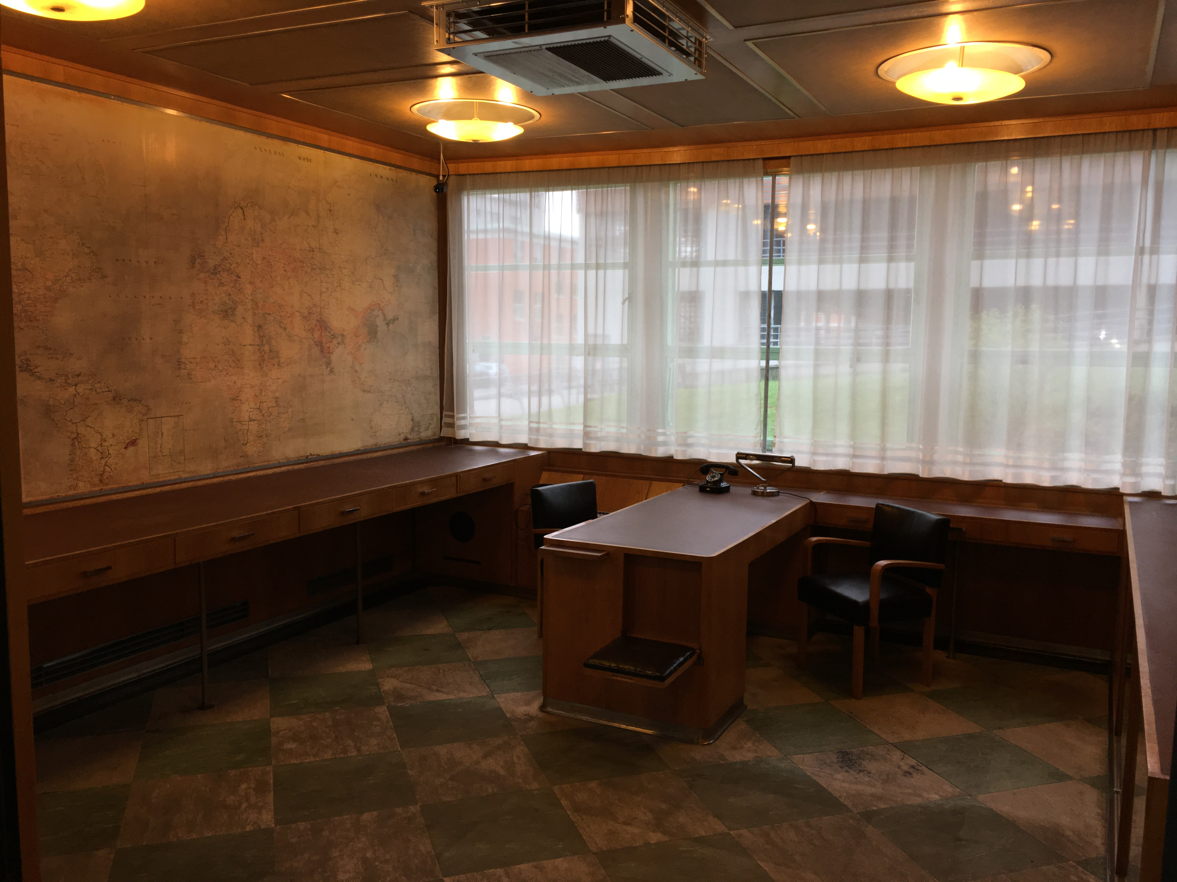 Baťa's Skyscraper, a.k.a. Building No. 21 in Zlín, Czech Republic